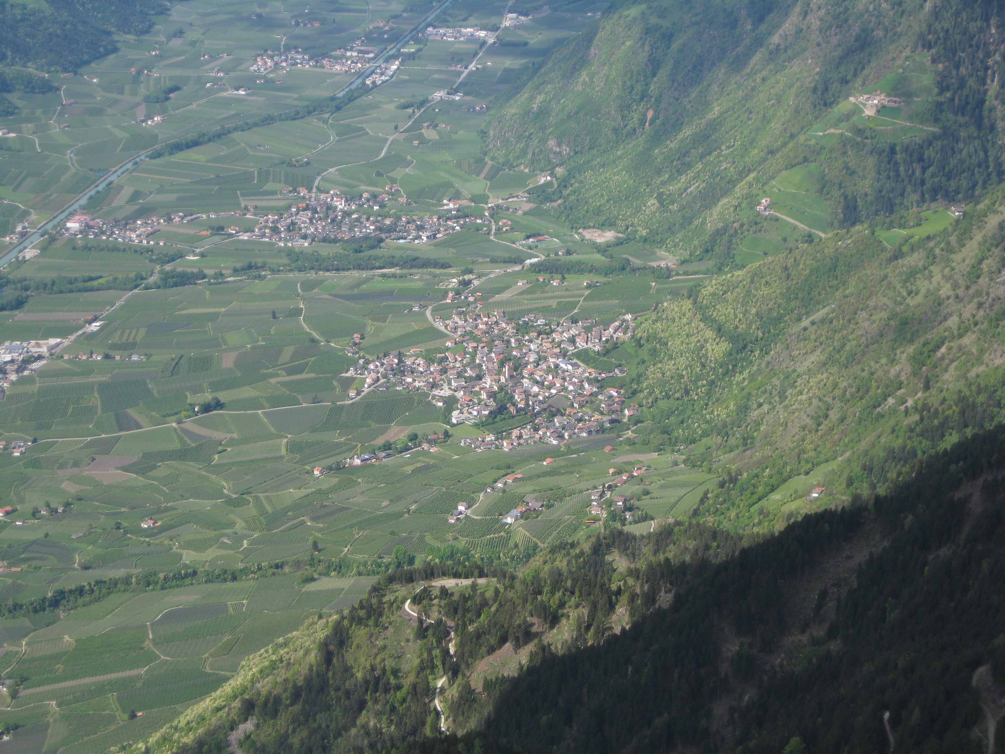 Partschins, Rabland und Plaus von der Mutspitze aus gesehen